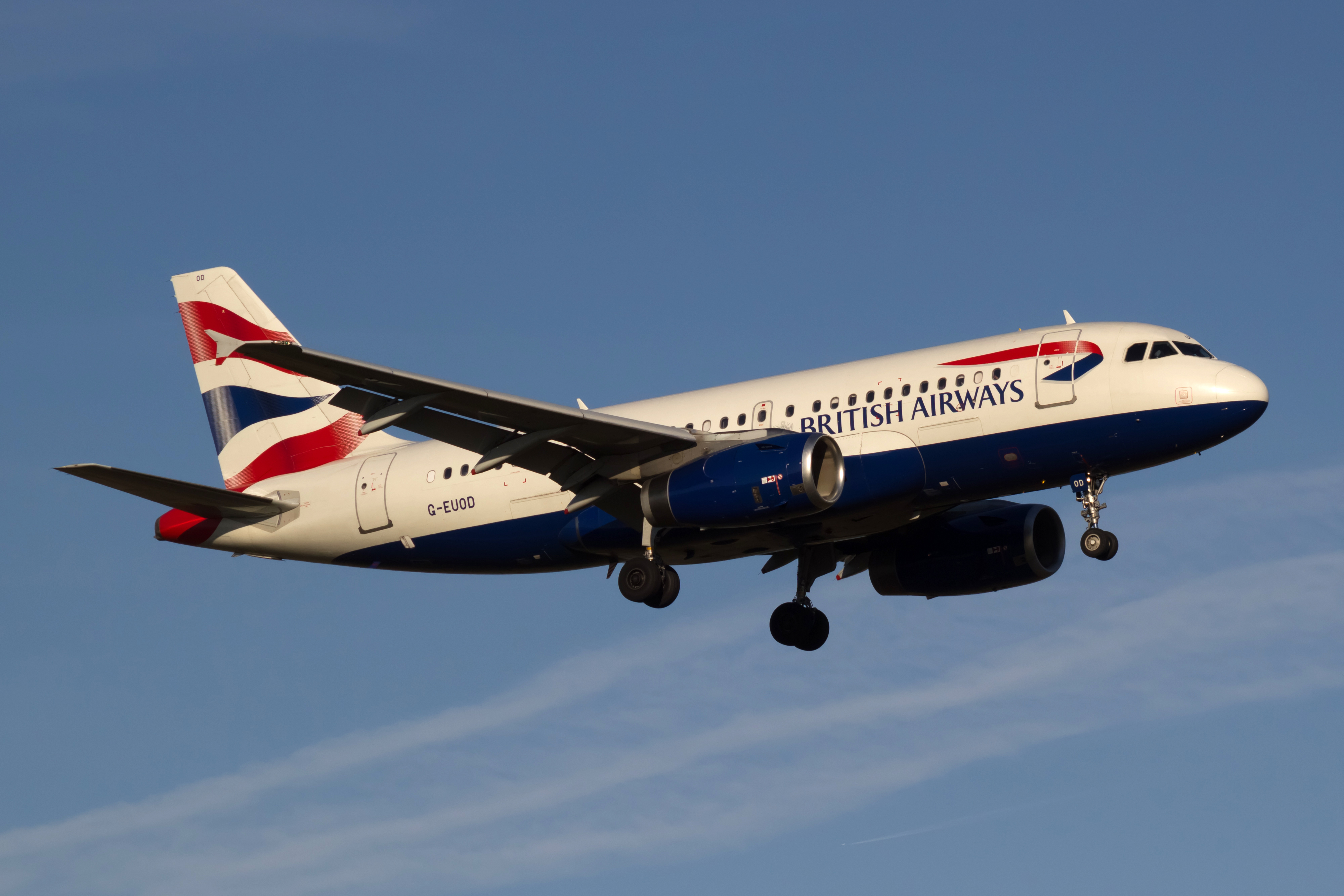 Airbus A319 de British Airways aterrando no aeroporto de Copenhague.